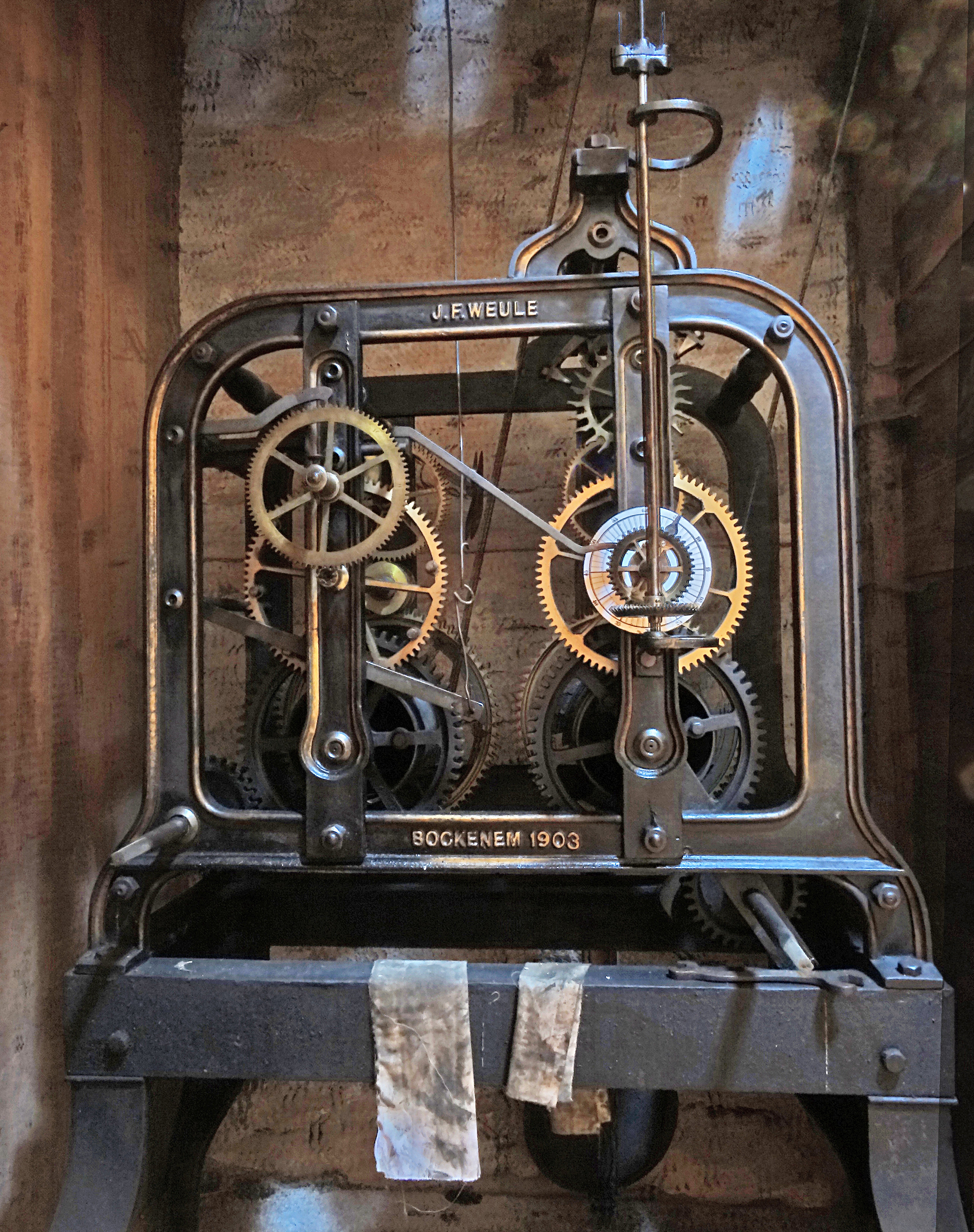 Turmuhr von J.F.Weule/ Bockenem (1903) in der Nicolaikirche Krimderode